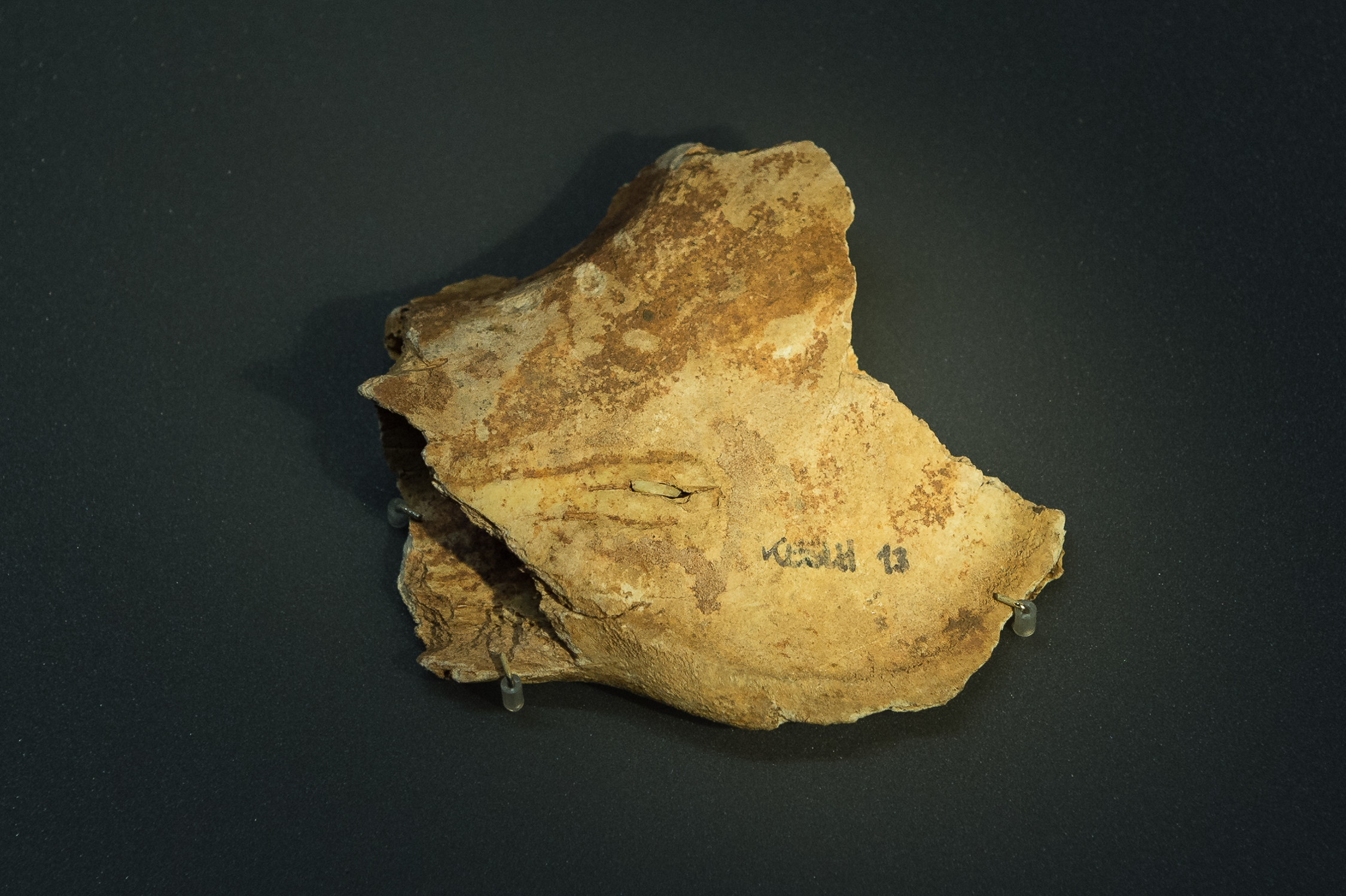 Unterkieferfragment eines Rentiers mit abgebrochener Projektilspitze und Anzeichen von Periostveränderungen im Bereich um die Eindringstelle. Magdalénien, Kesslerloch. Ausgestellt im Museum zu Allerheiligen in Schaffhausen, Schweiz.